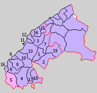 島根県邇摩郡の町村制時点の町村。